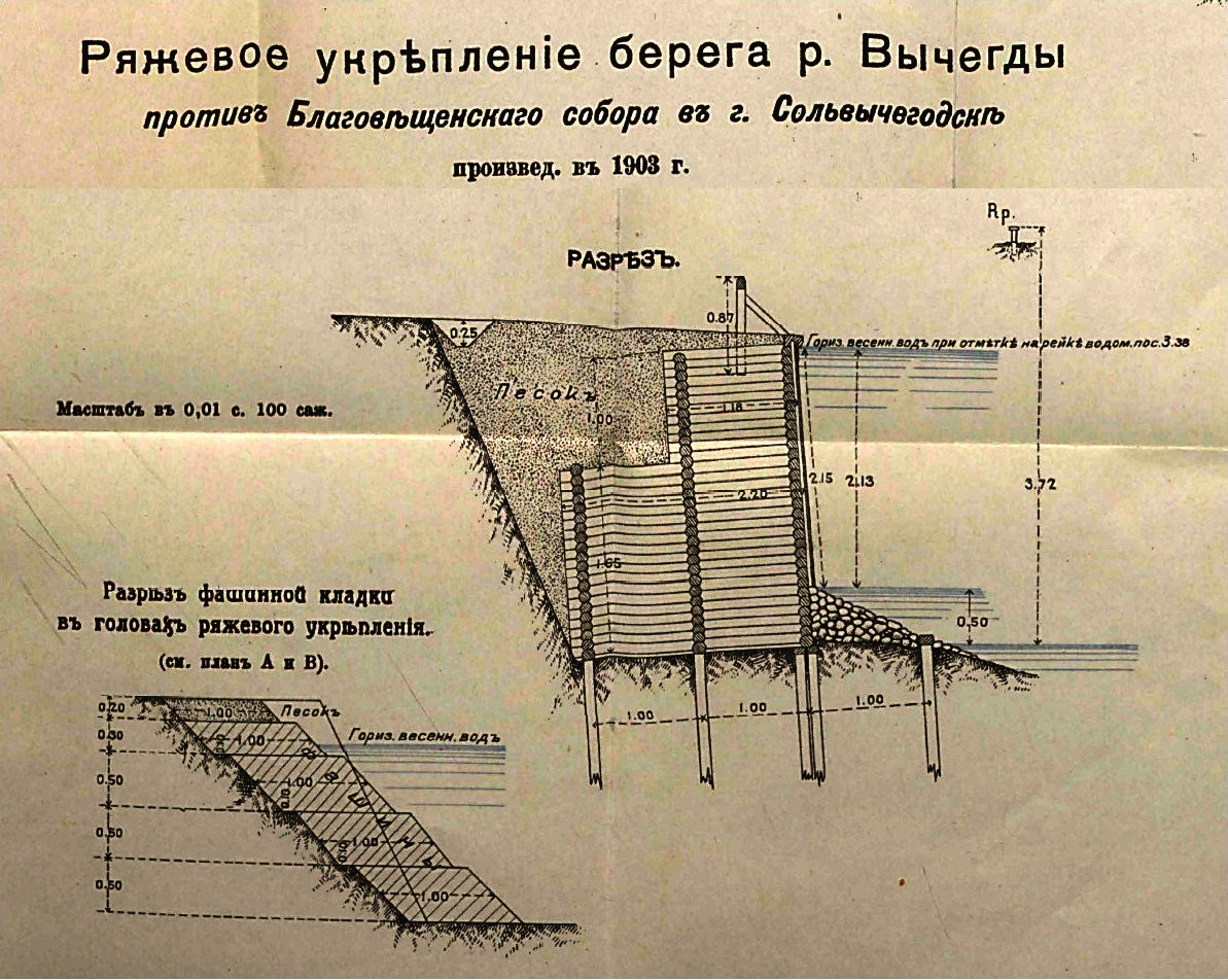 Сольвычегодск. Укрепление берега